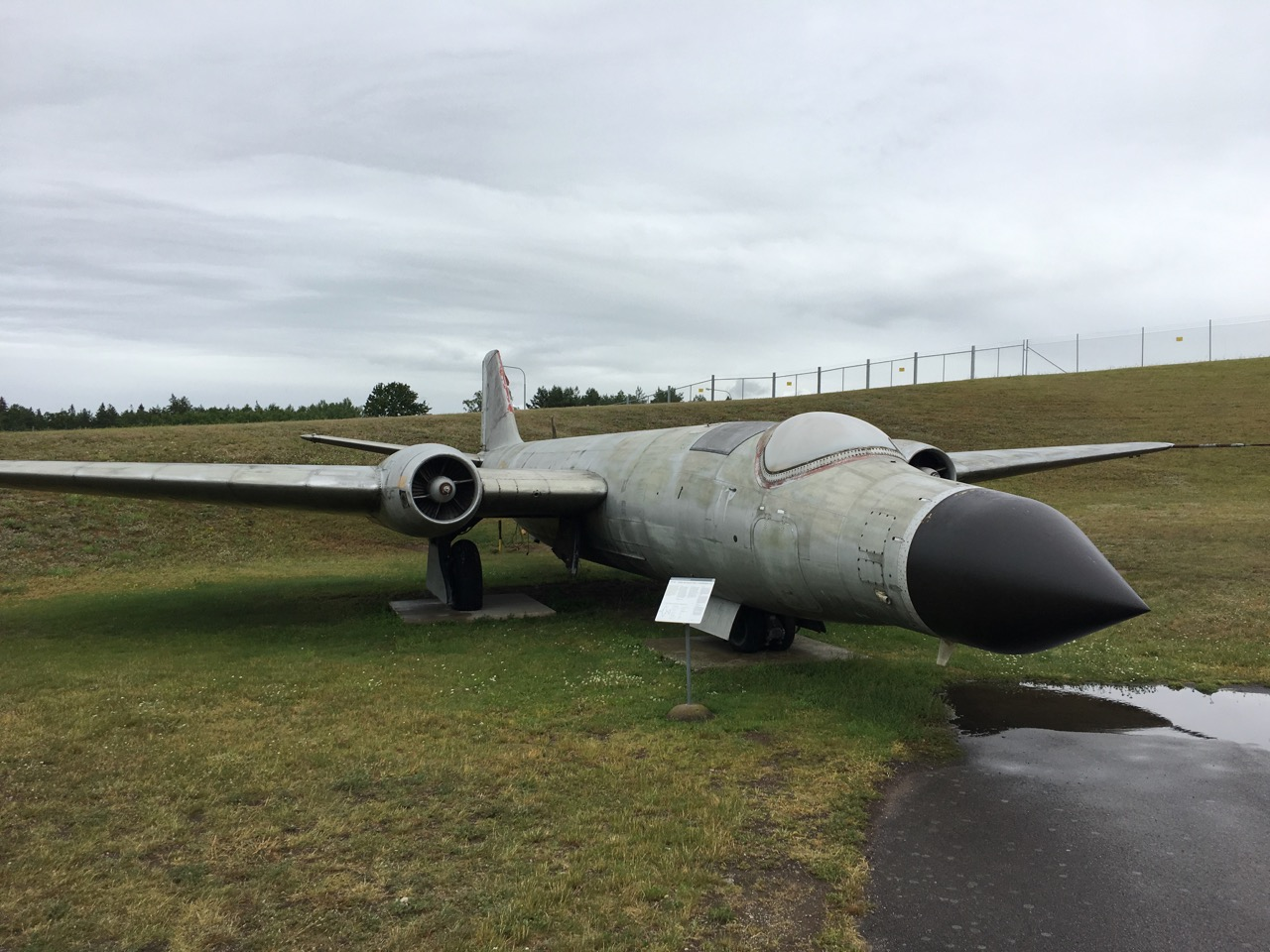 English Electric Canberra 52002 (TP52) vid Flygvapenmuseum i Linköping (juli 2019).